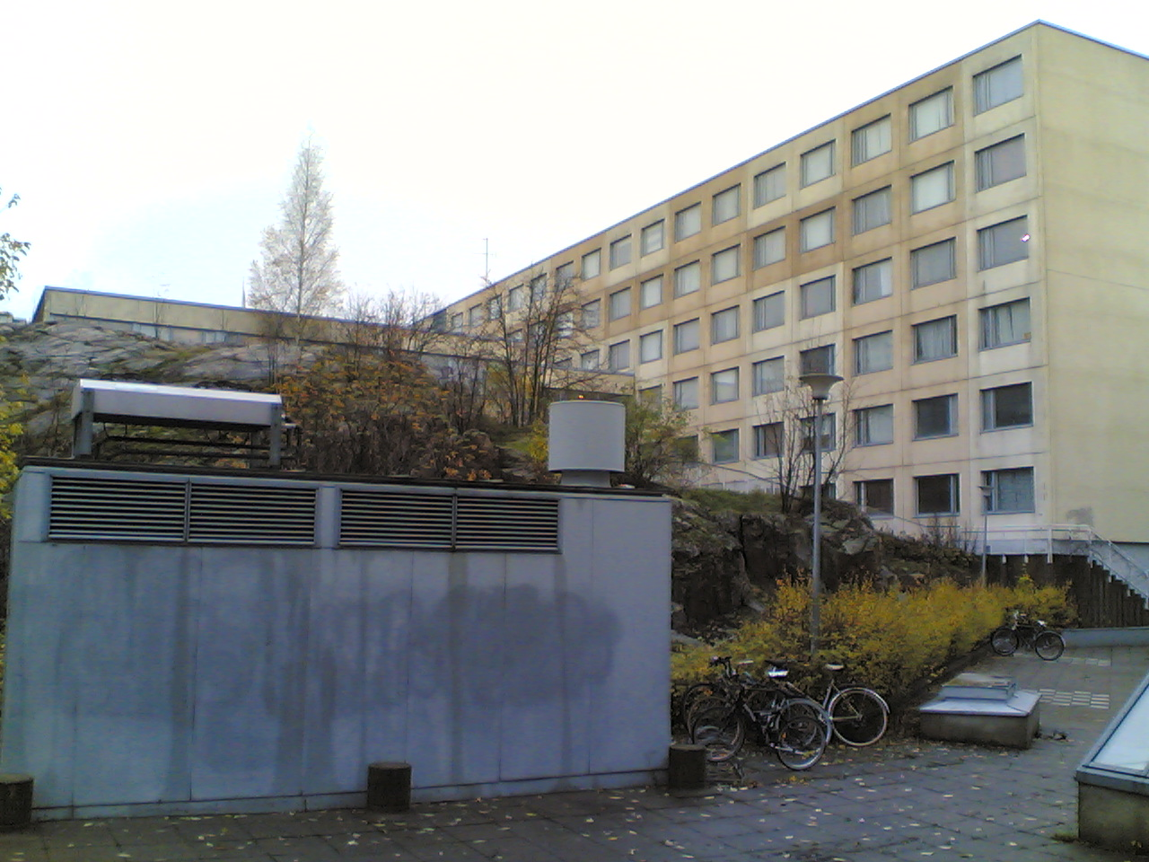 Nuorisosäätiön talo